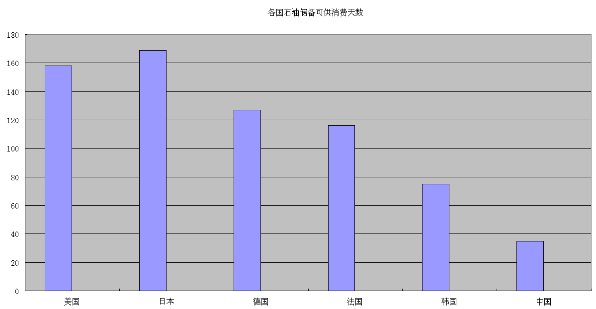 中文（中国大陆）: 2012年各国石油储备可供消费天数